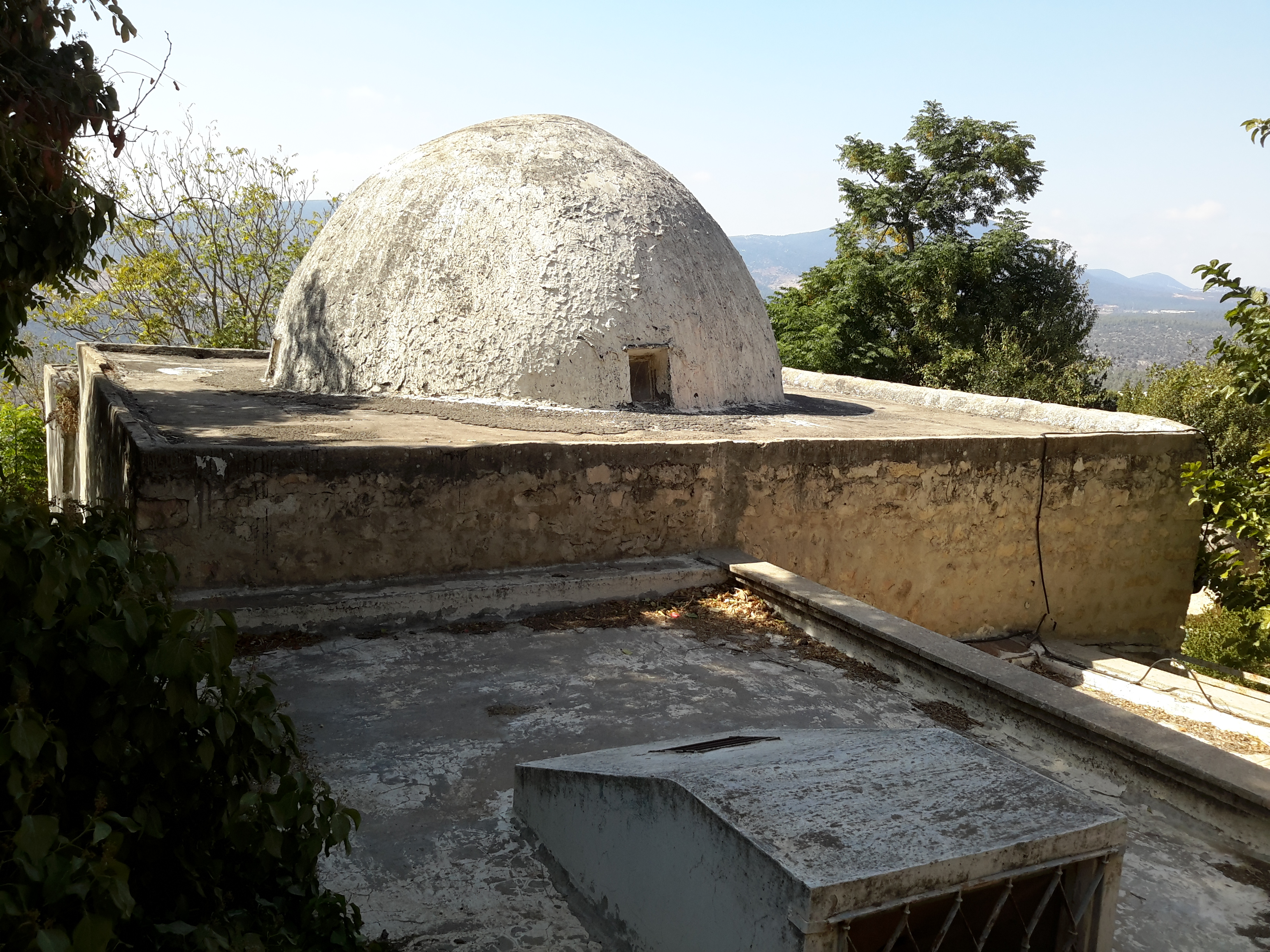 בית המרחץ התורכי אותו שיפץ ציפר והפך לסטודיו, לגלריה ודירת מגורים וגנו היה לגן פסלים